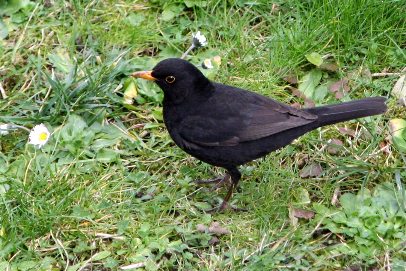 Blackbird